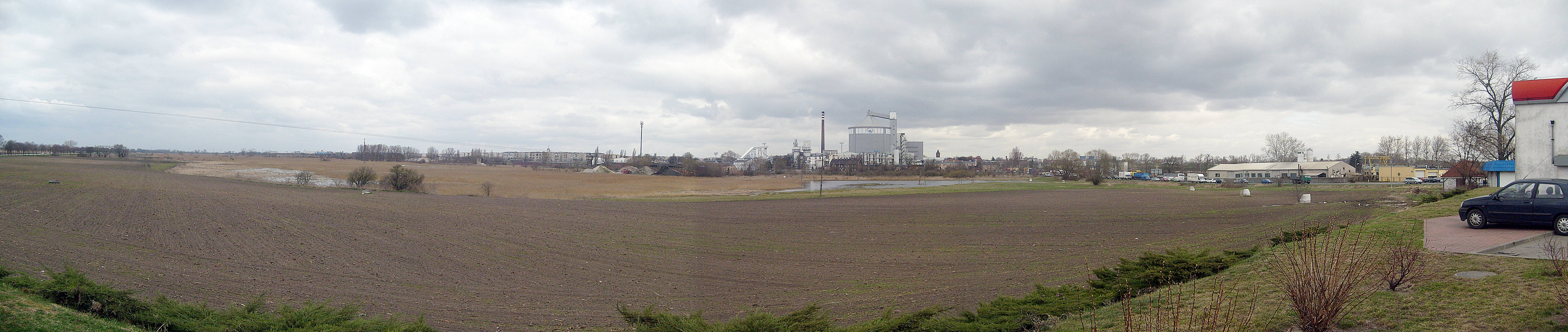 bagna średzkie, Środa Wielkopolska